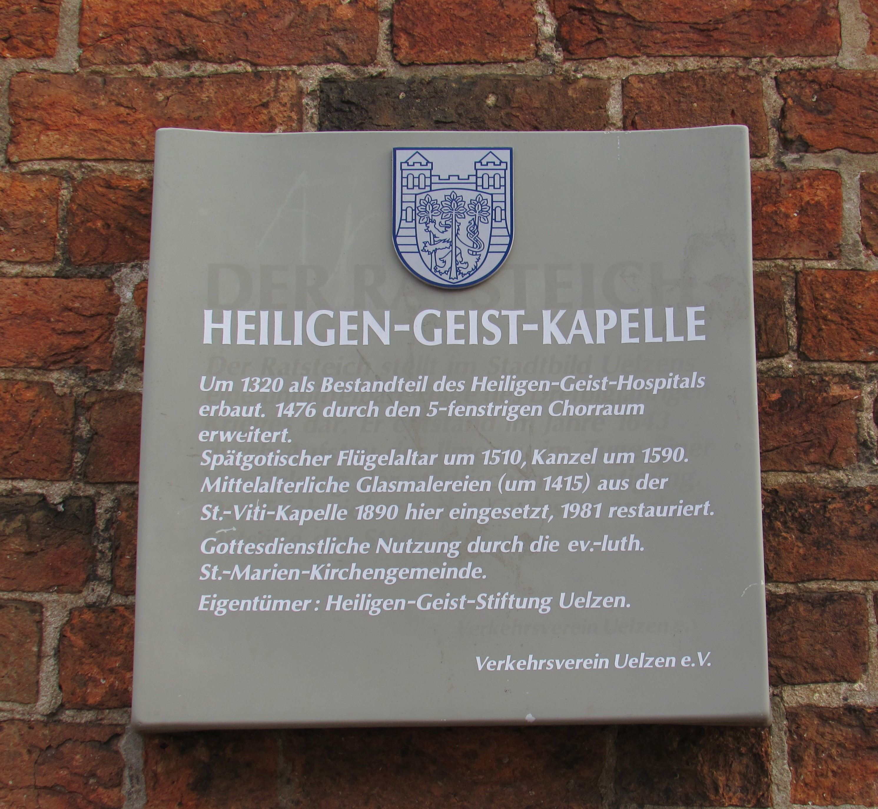 Schild an der Vorderseite von der Heiligen-Geist-Kapelle in Uelzen